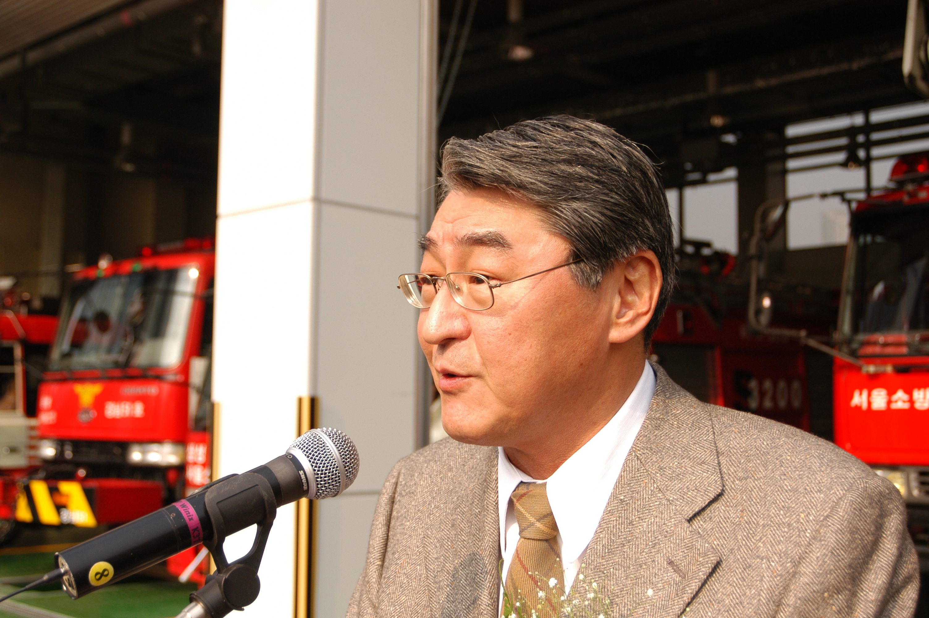 양윤재, 2004년 11월 서울특별시 강남구 강남소방서 준공식